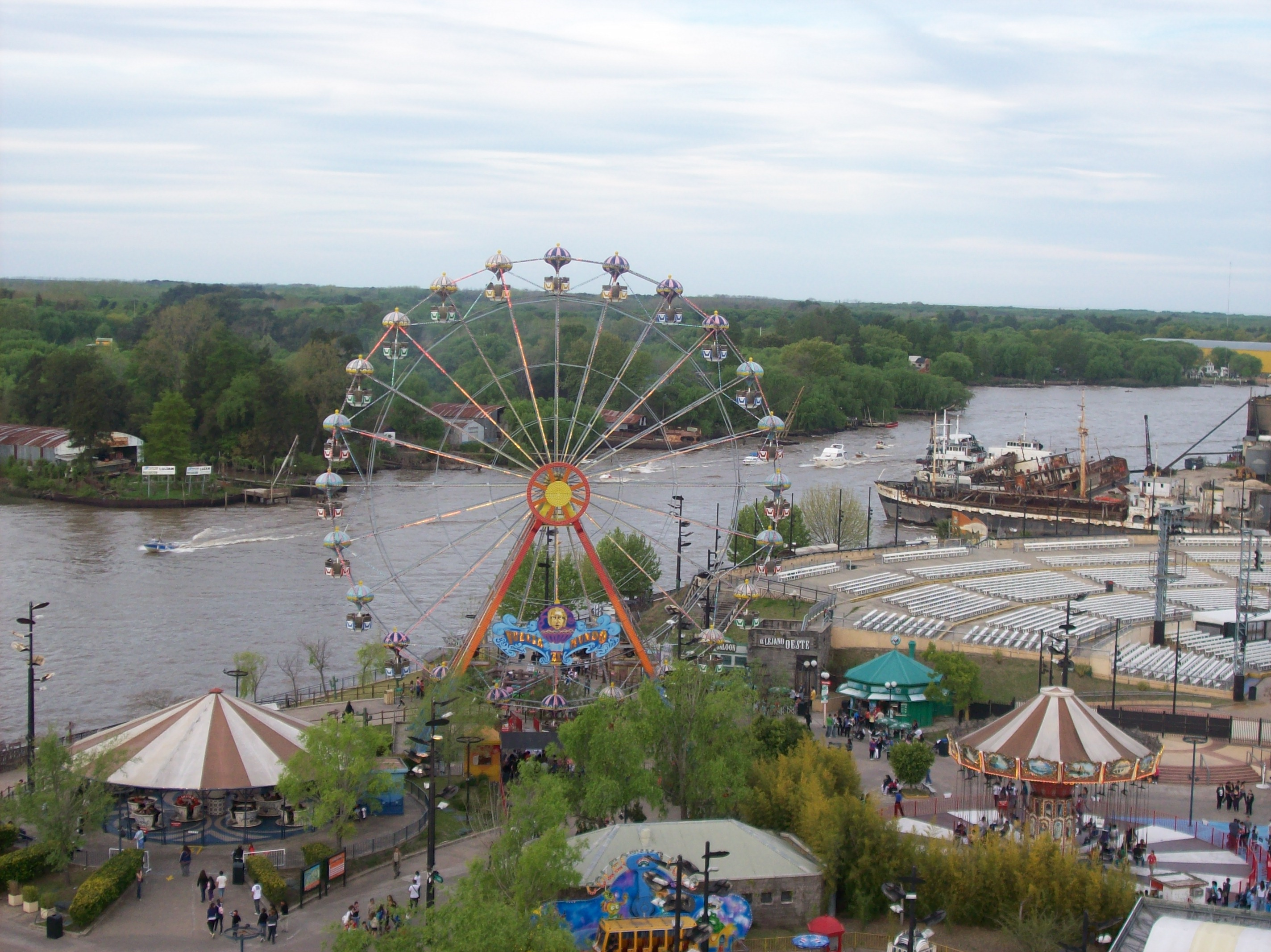 Parque de la Costa y Río Luján en la ciudad de Tigre, provincia de Buenos Aires, Argentina.